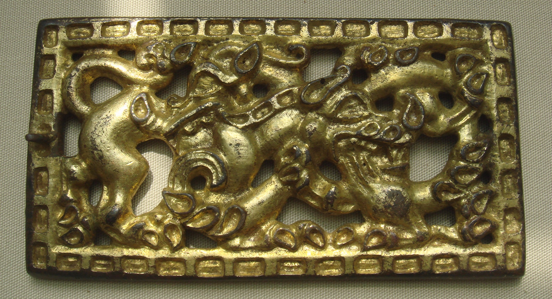 Belt Buckle Ordos 3-1Century BCE